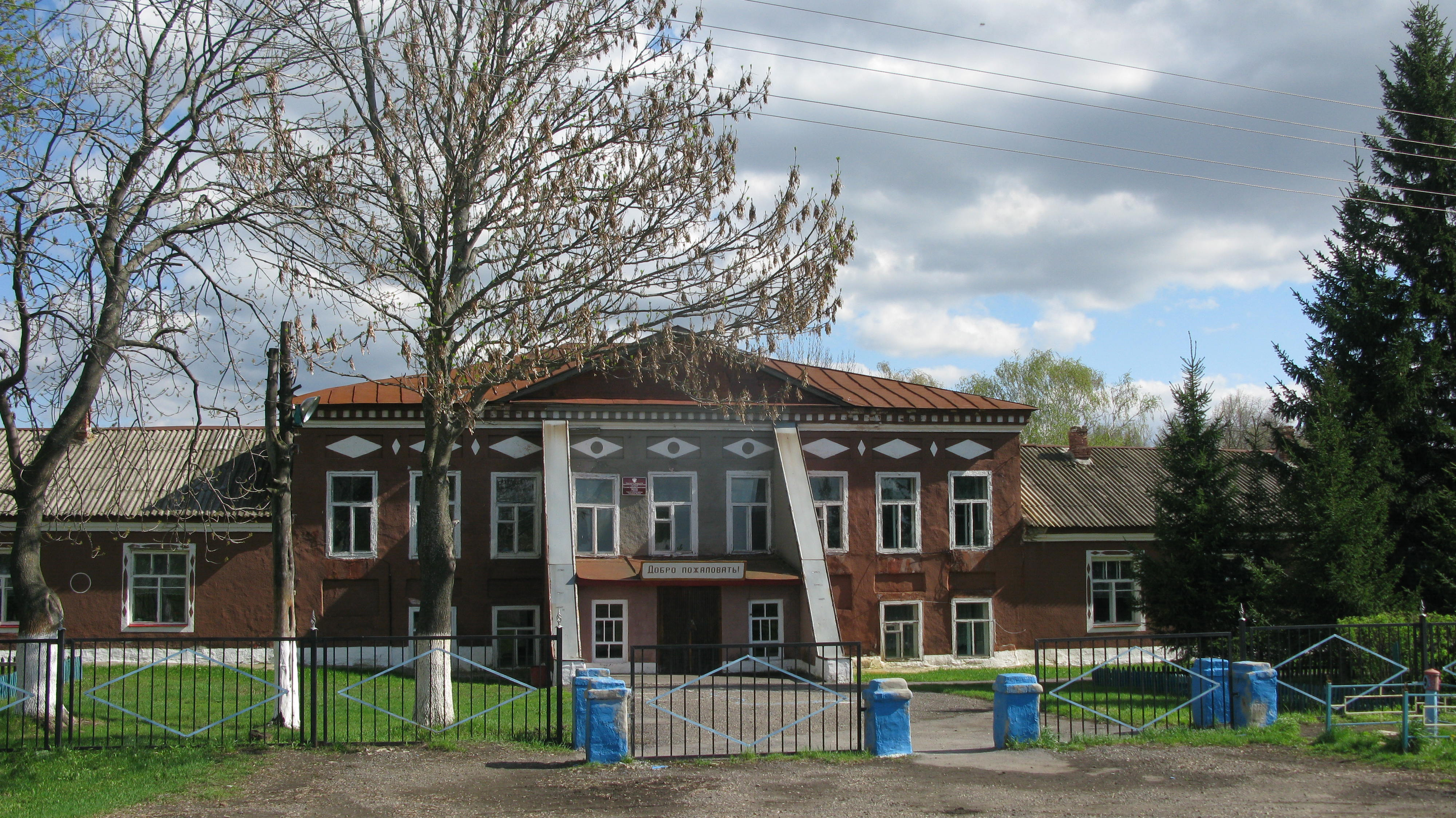 Урусовская школа